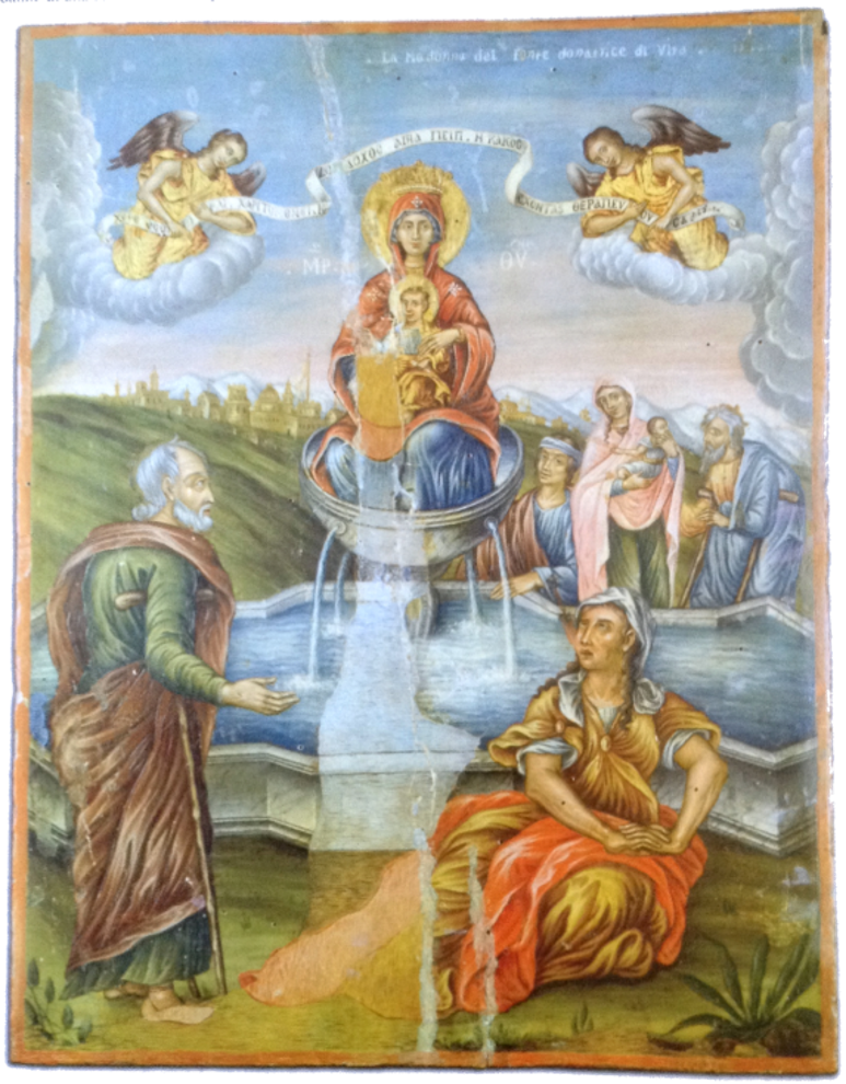 Ikone der Gottesmutter der lebensspendenden Quelle in der Chiesa Santa Maria Assunta in Villa Badessa, Eustathios Karusos von Kefalonia, 1769